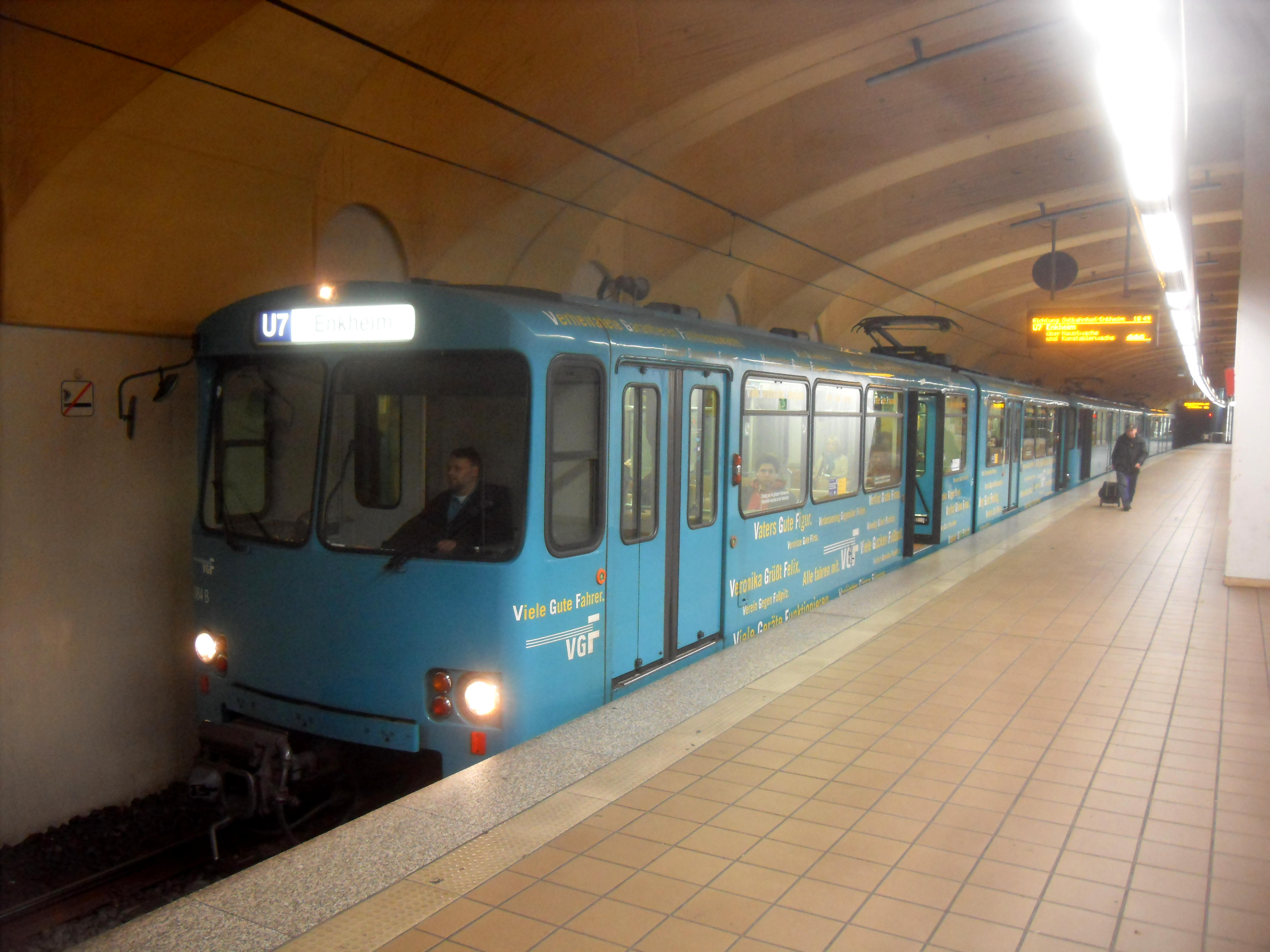 U 2-Triebwagen der U-Bahn Frankfurt im U-Bahnhof Alte Oper auf der Linie U 7 auf dem Weg nach Frankfurt-Bergen-Enkheim in Hessen (Deutschland)